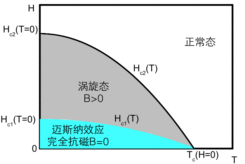 第二类超导体 H vs T 制作者 zzxiaoquan